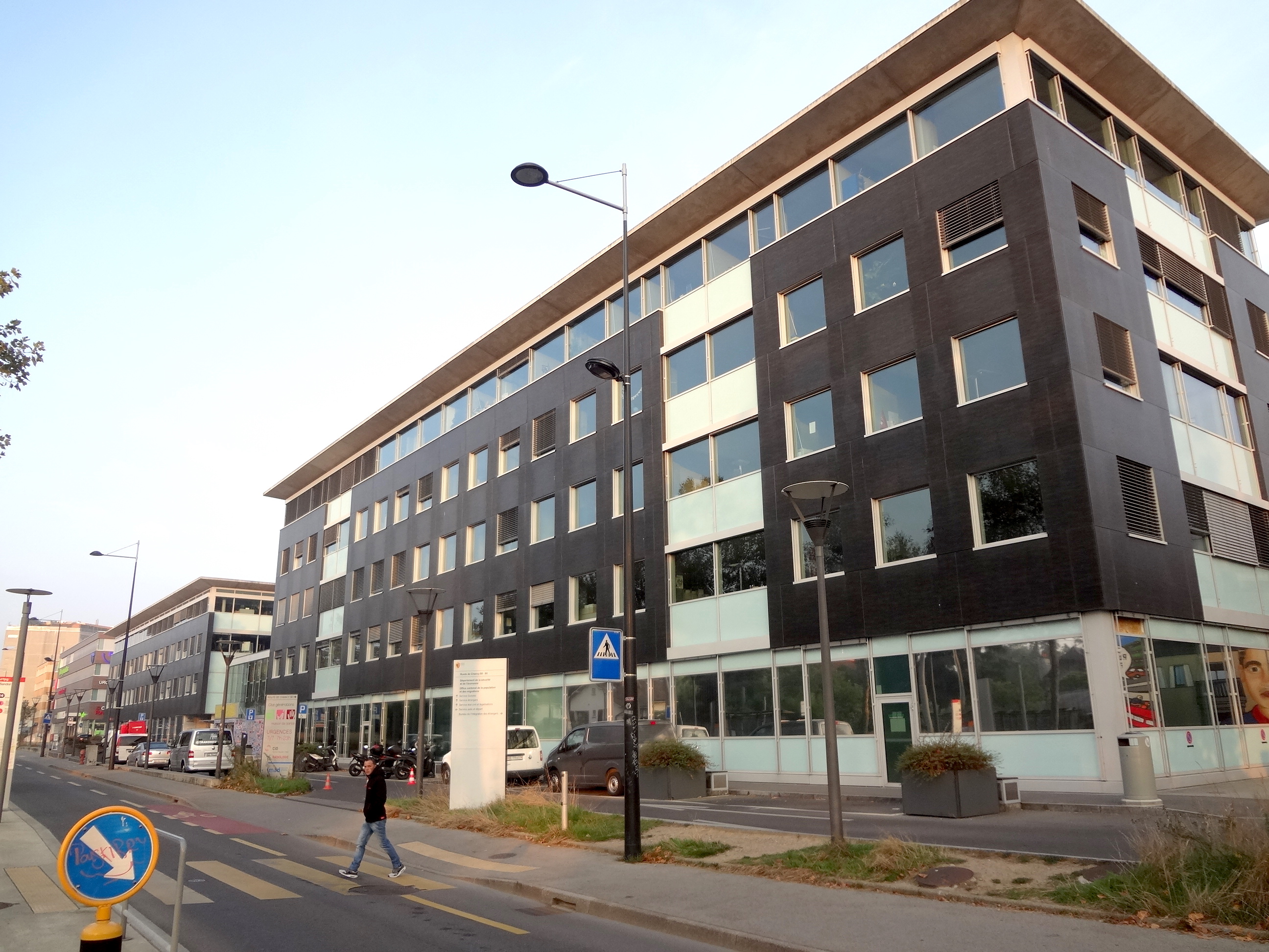 Office cantonal de la population et des migrations (Département de la sécurité et de l'économie - DSE), canton de Genève, situé à Onex. Immeuble réalisé en 2005-2007 par Atelier d'architectes Grivel & Cie SA (AAG+).